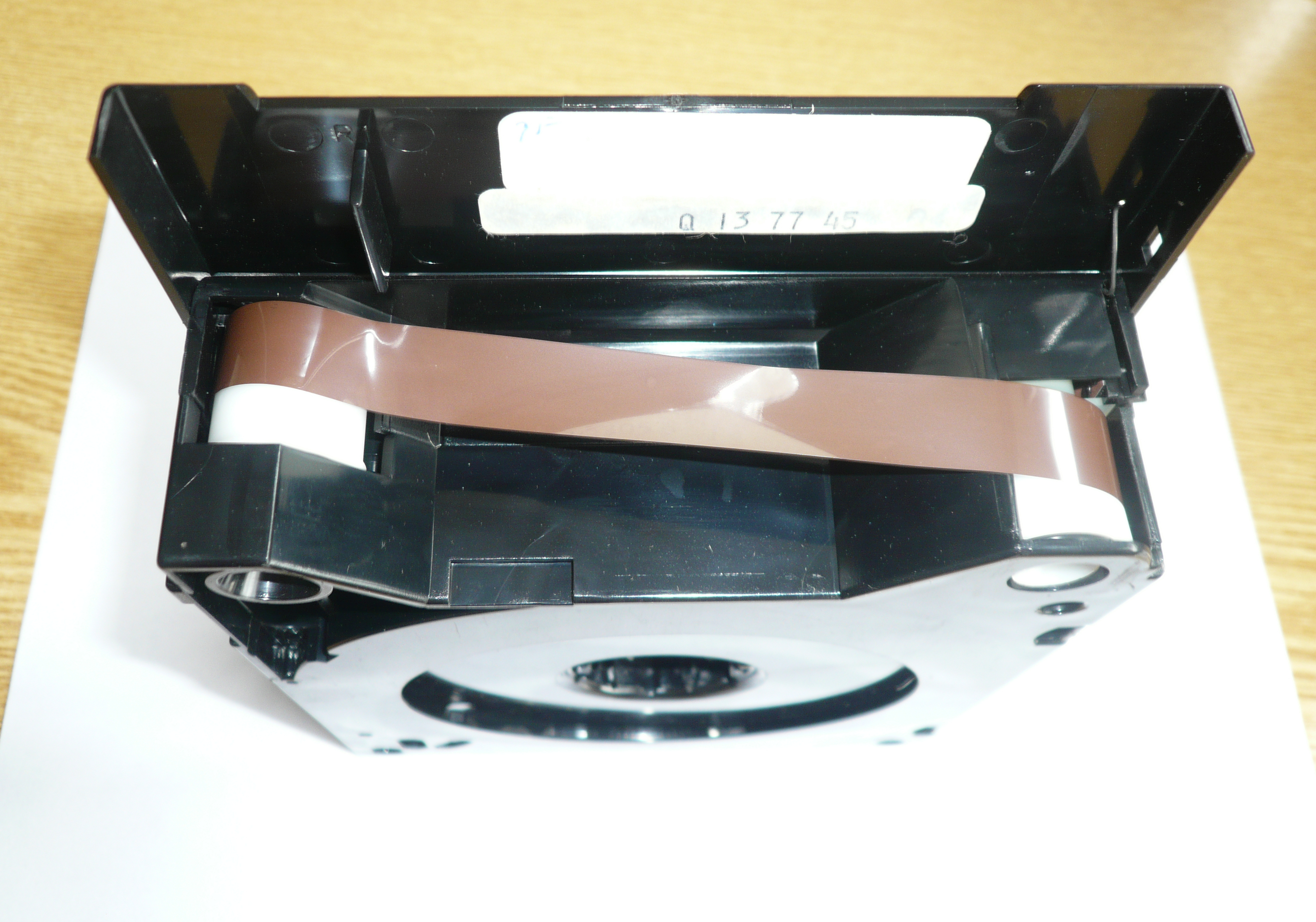 VCR-Kasette